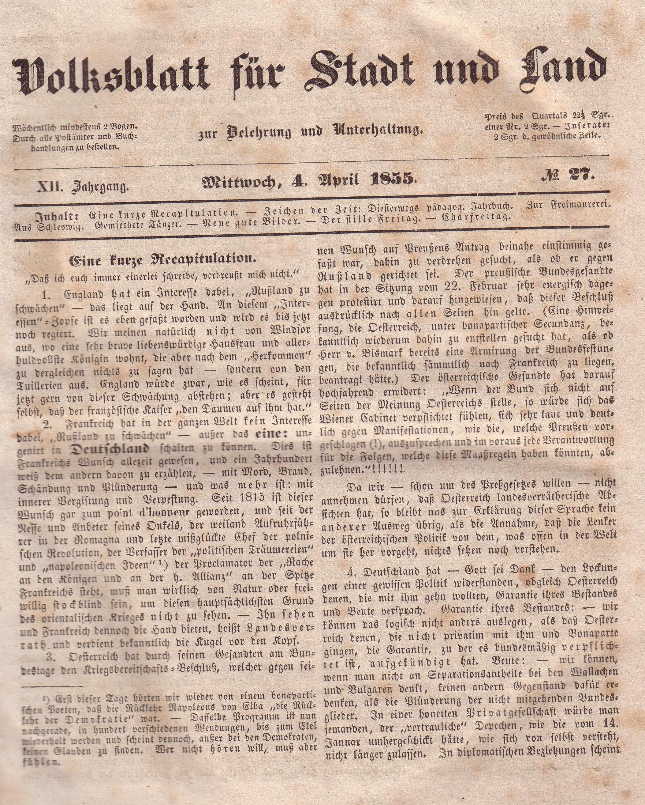 Volksblatt für Stadt und Land, XII Jahrgang, Mittwoch 4. April 1855, Nr 27.